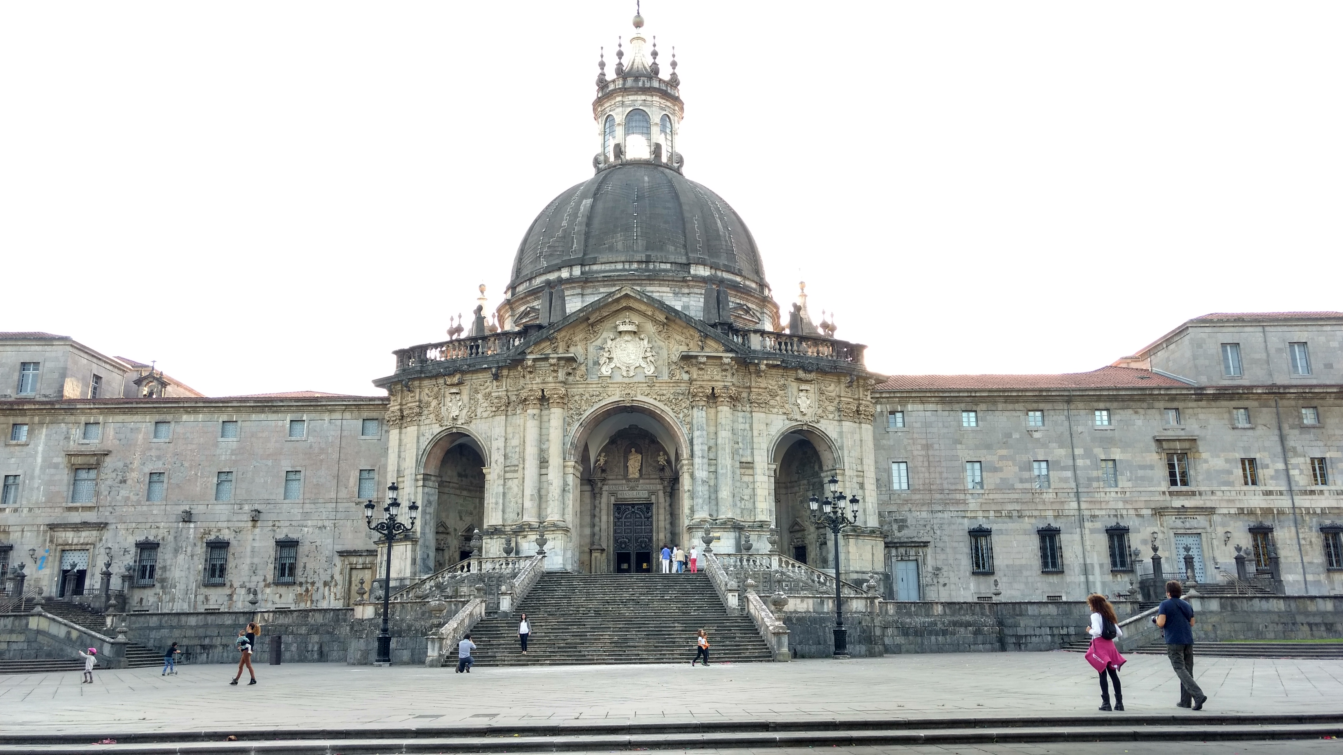 Loiolako Santutegia